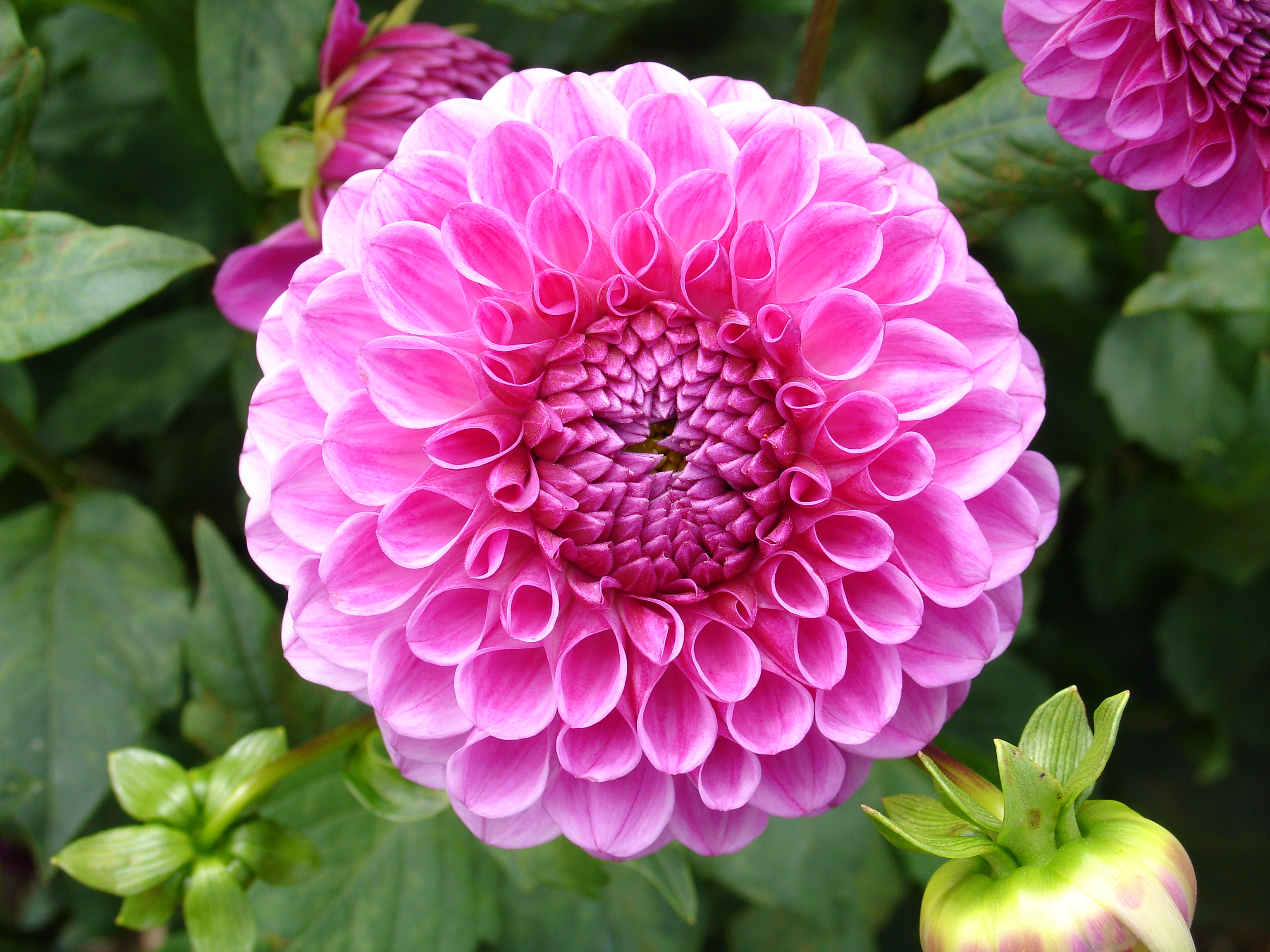 Dahlie